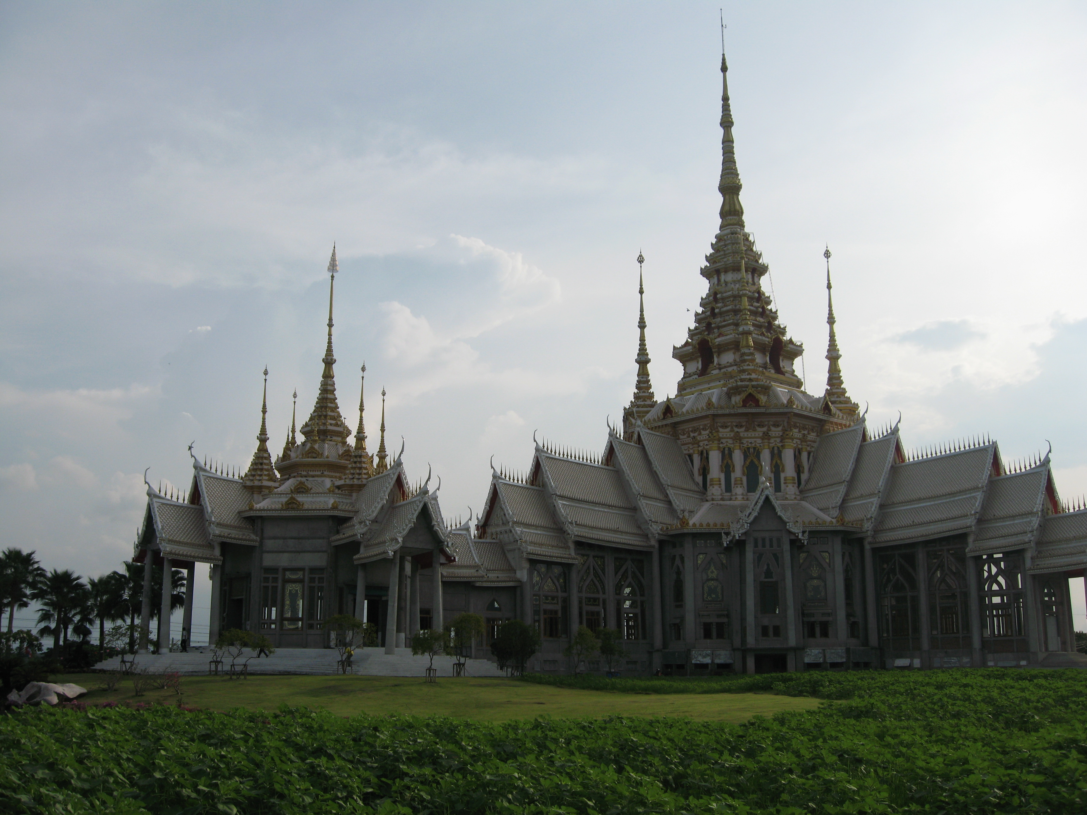 วิหารหวงพ่อโต